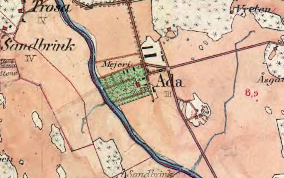 Åda säteriet på Häradsekonomiska kartan